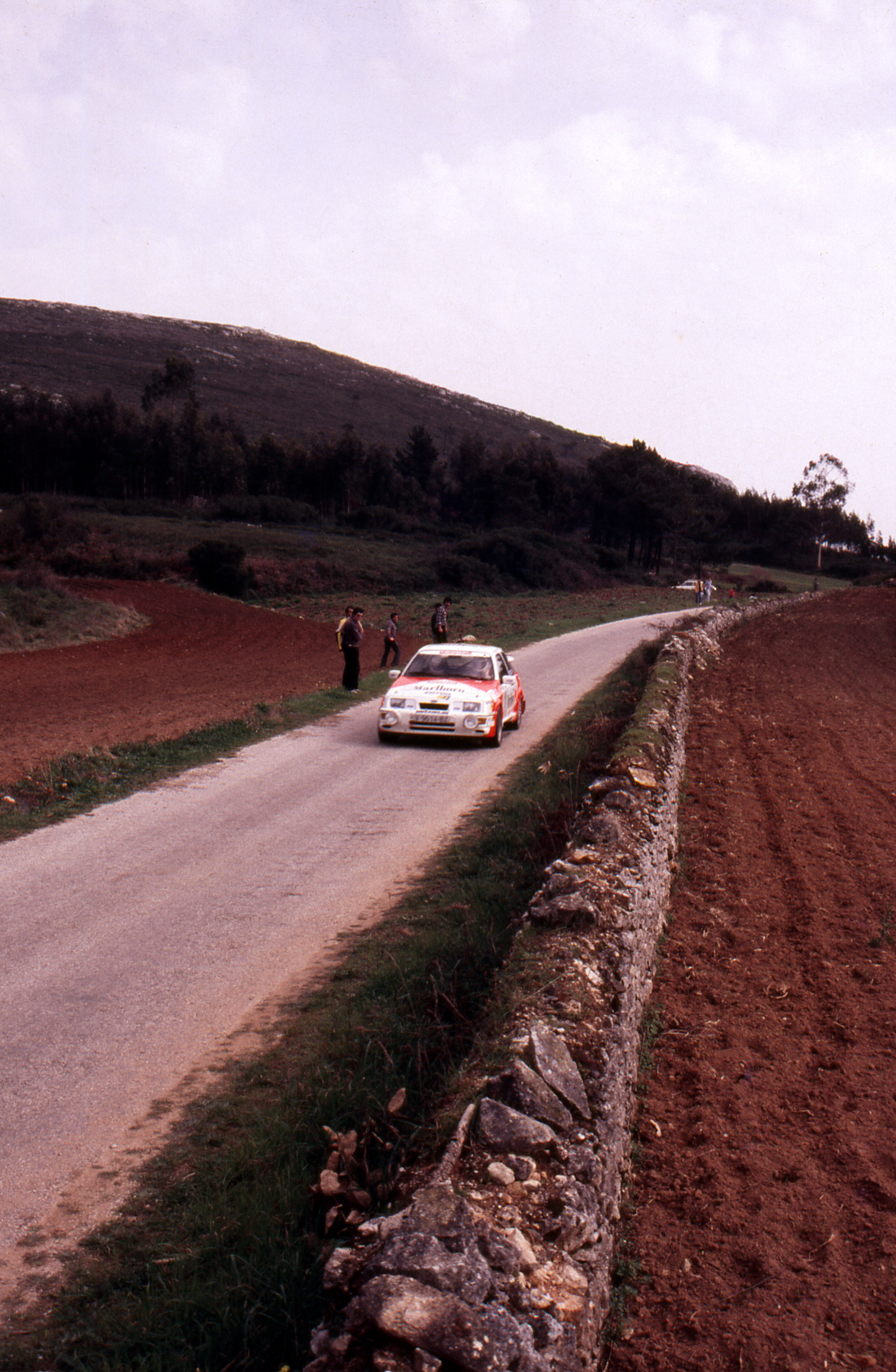 21º Rallye de Portugal - Vinho do Porto 1987 - PEC Montejunto - 11MAR1987 a 14MAR1987